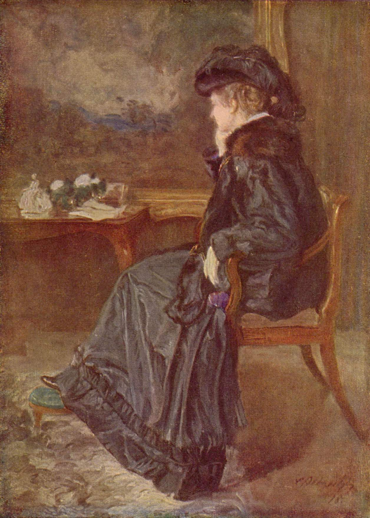 Porträt der Anna Elisabeth Agnes, Gattin des Künstlers